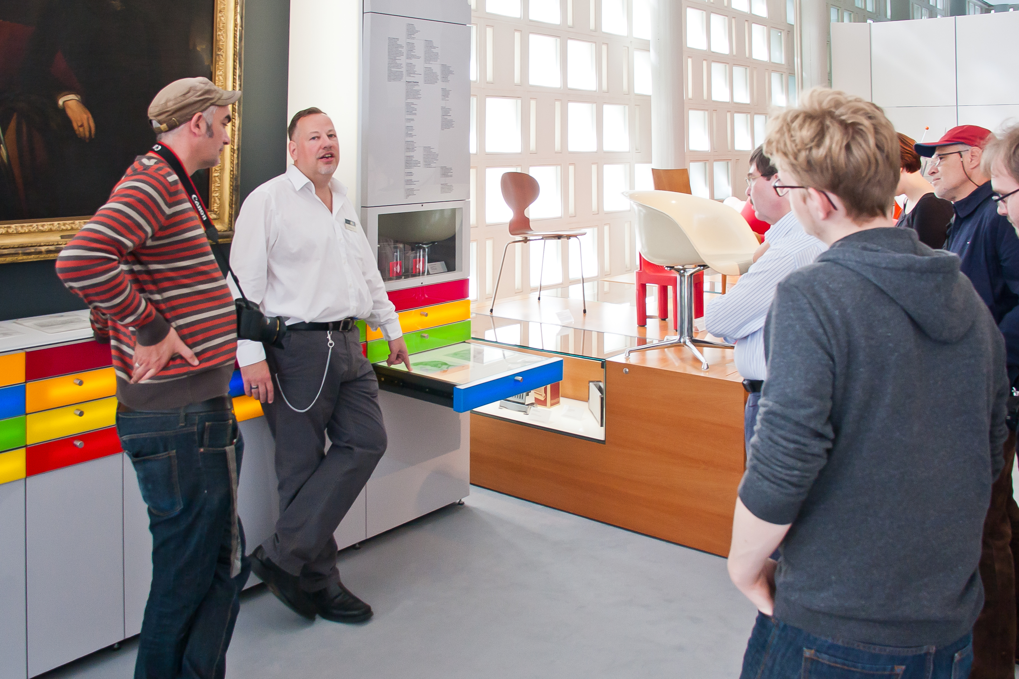 DeGLAMwiki August 2013 - Führung für Wikipedianer durch das Museum Augst Kestner